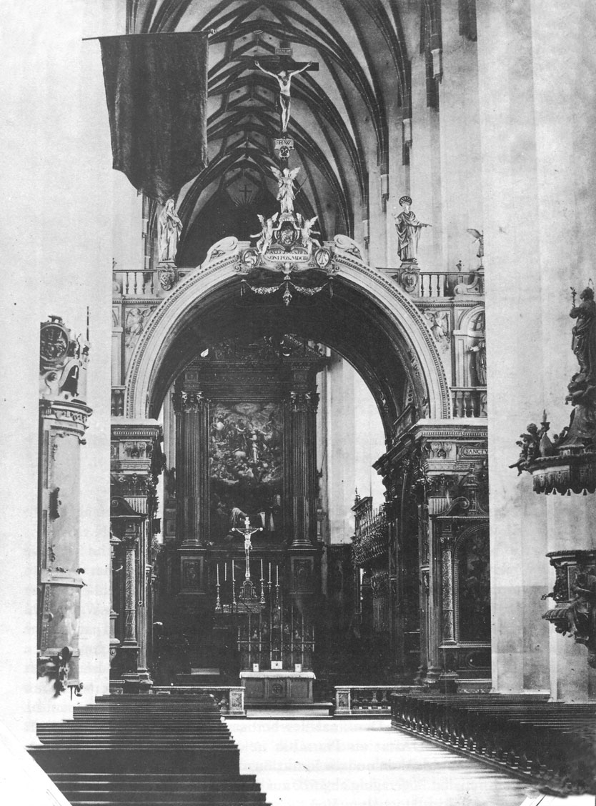 München, Innenraum der Frauenkirche mit dem Bennobogen